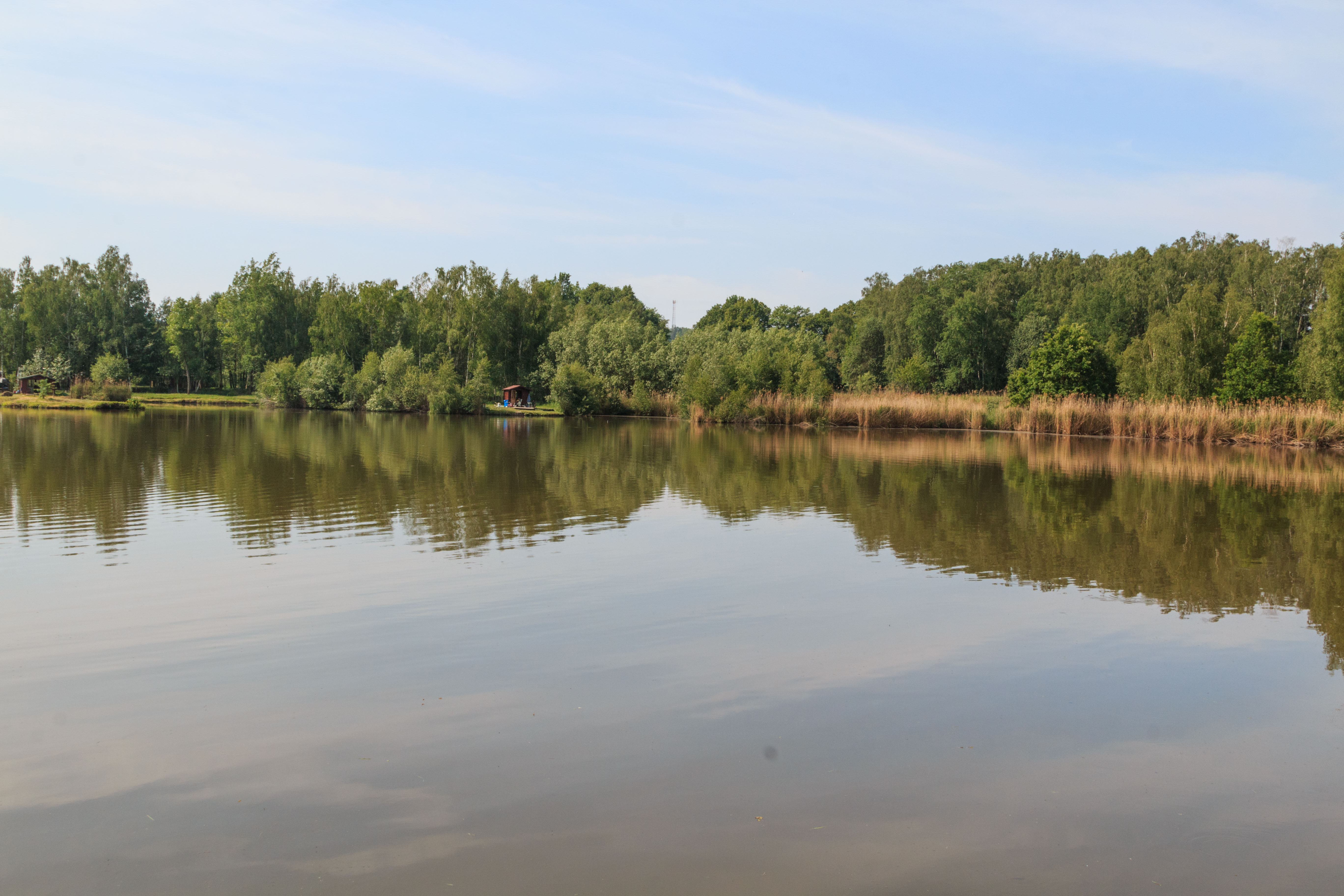 Černý rybník u Zdechovic Project: Vodstvo.